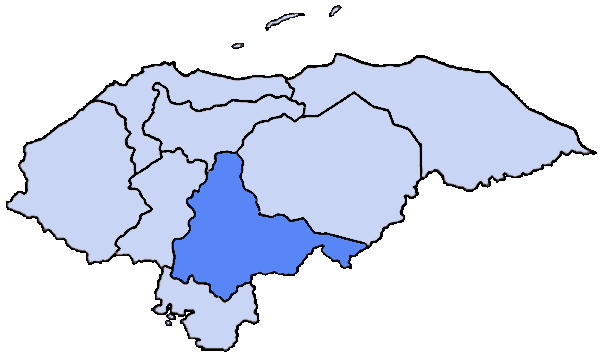 Mappa dell'arcidiocesi di Tegucigalpa, in Honduras.